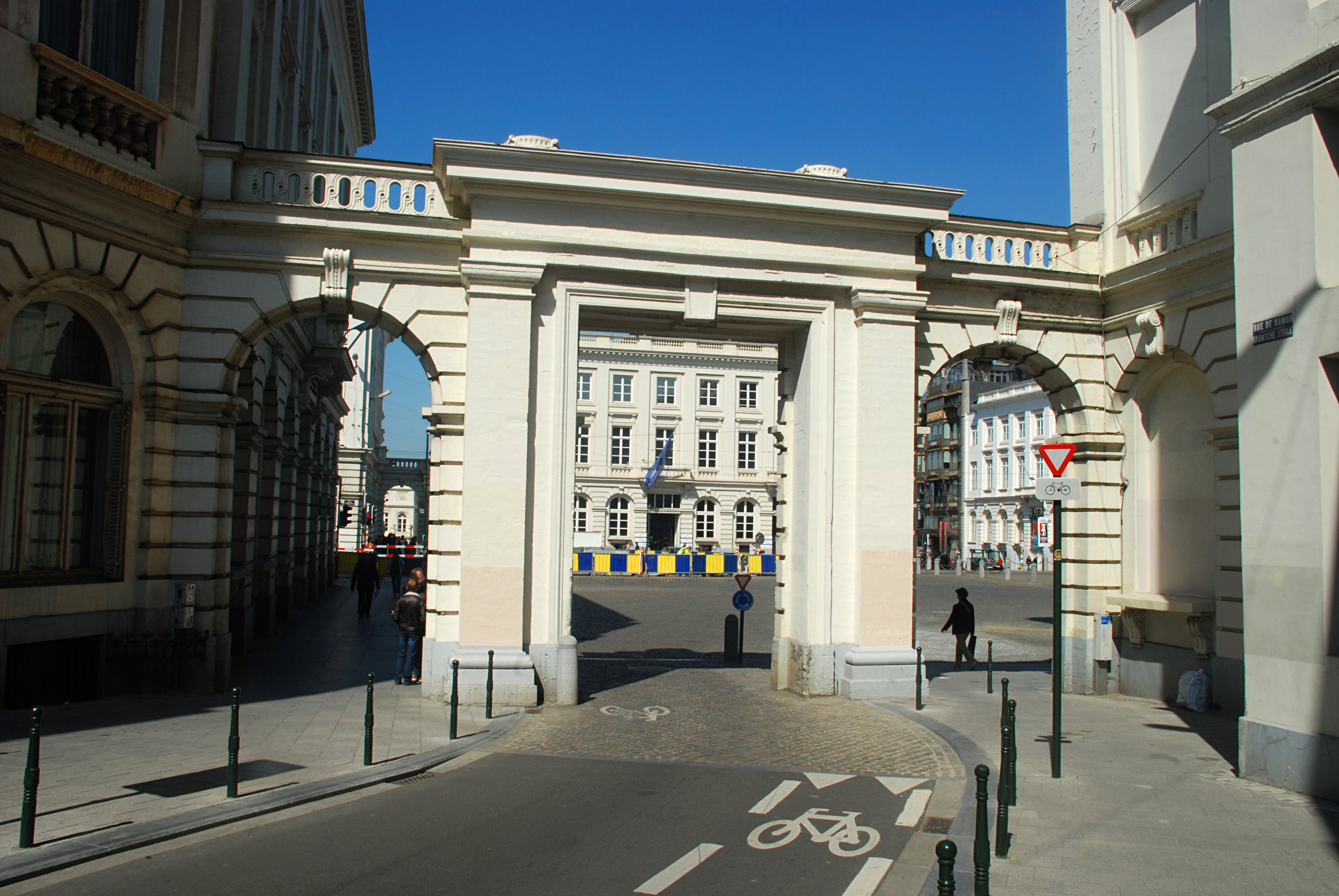 Belgique - Bruxelles - Place Royale - Portique de la rue de Namur